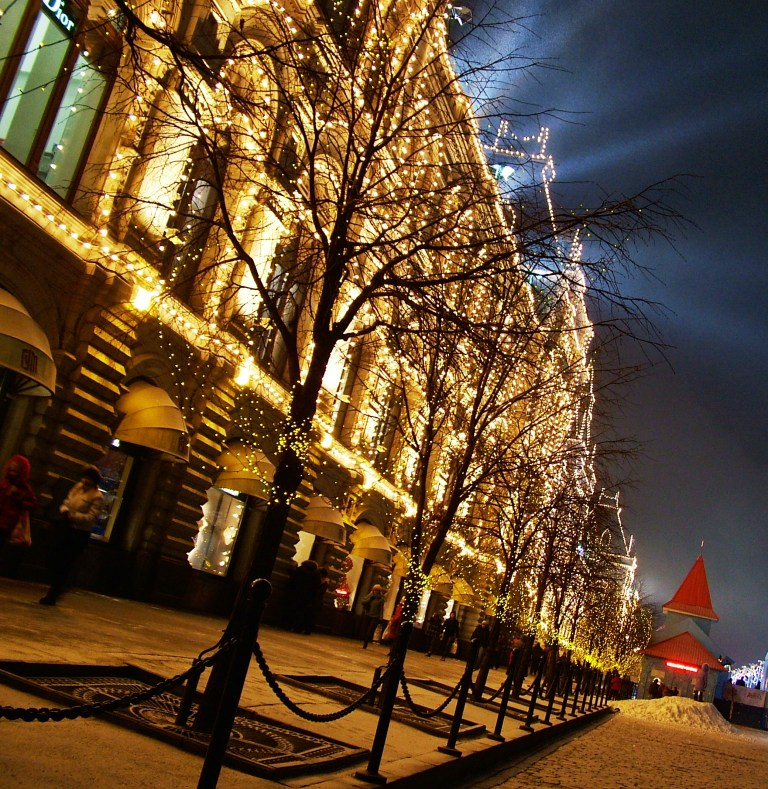 A GUM áruház karácsonyi kivilágítással